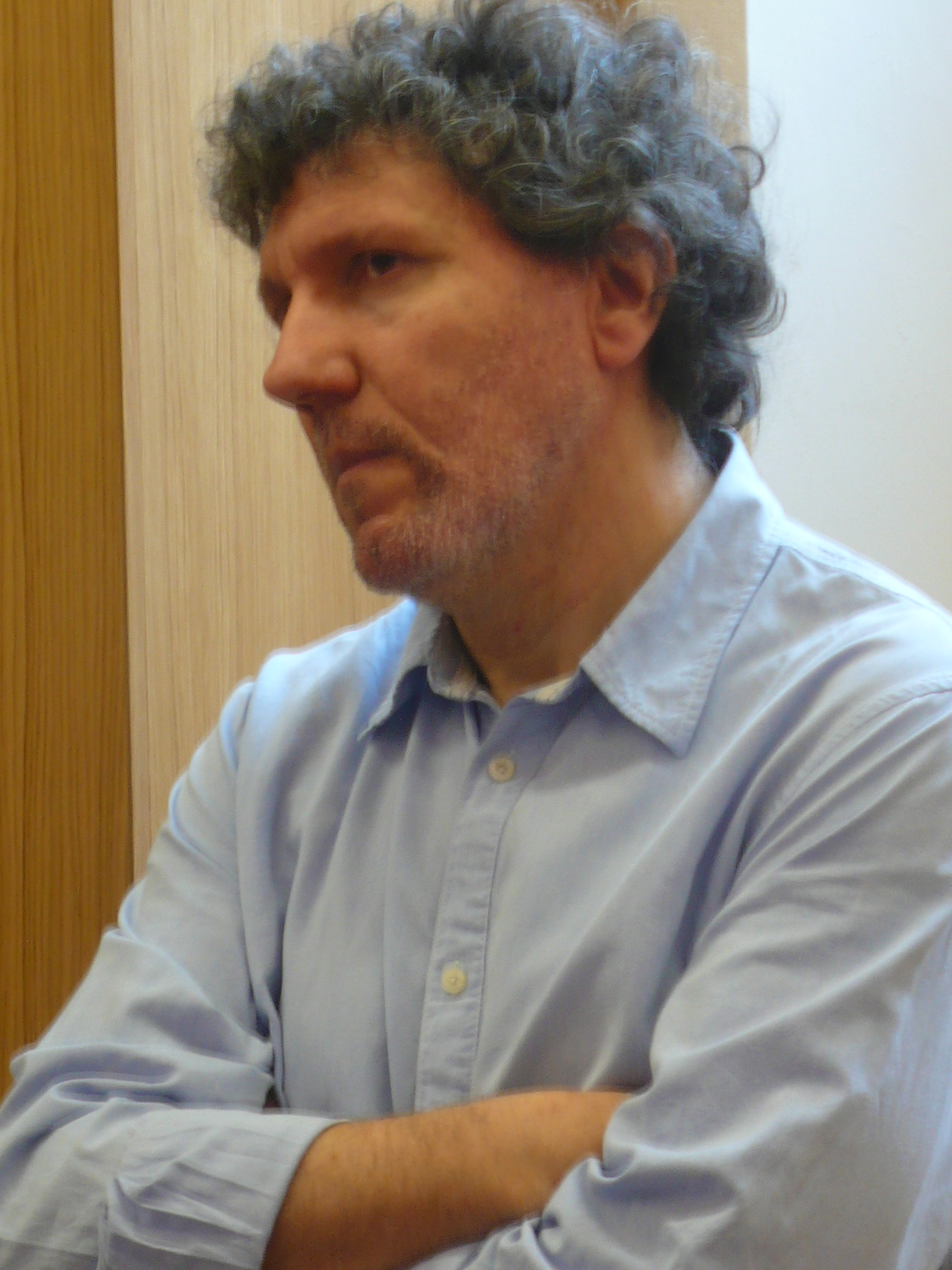 Antonio Ferrara